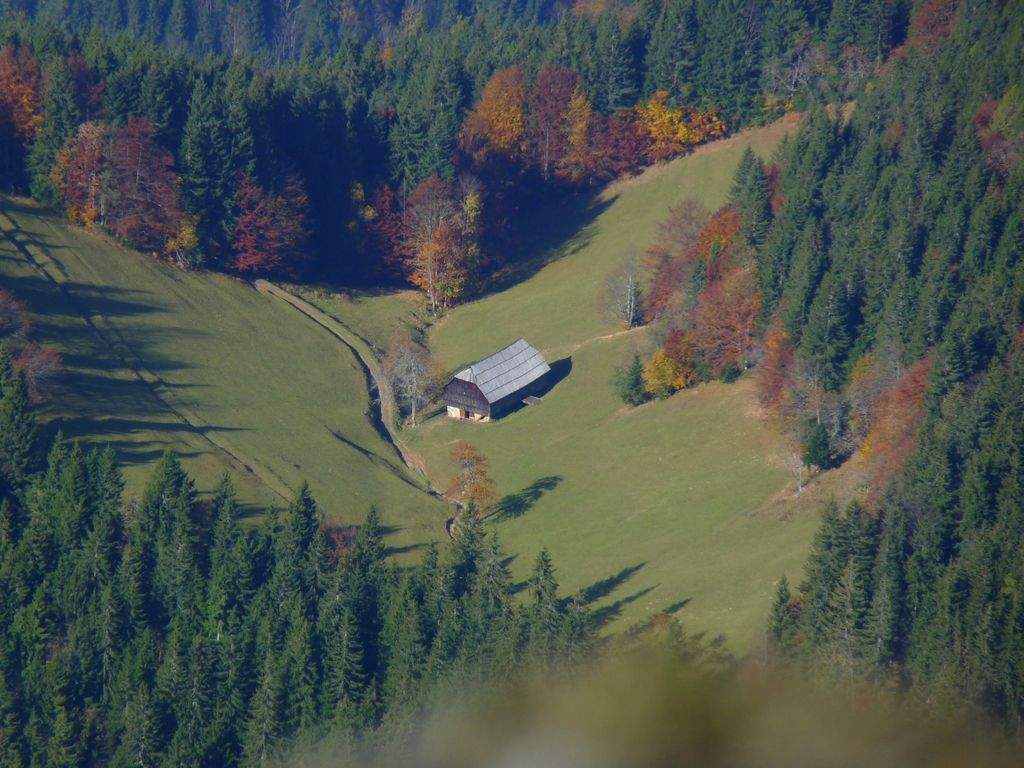 Planina Javorje nad Solčavo